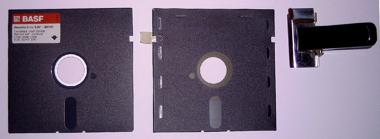 Schreibkerb-Stanze (Locher)